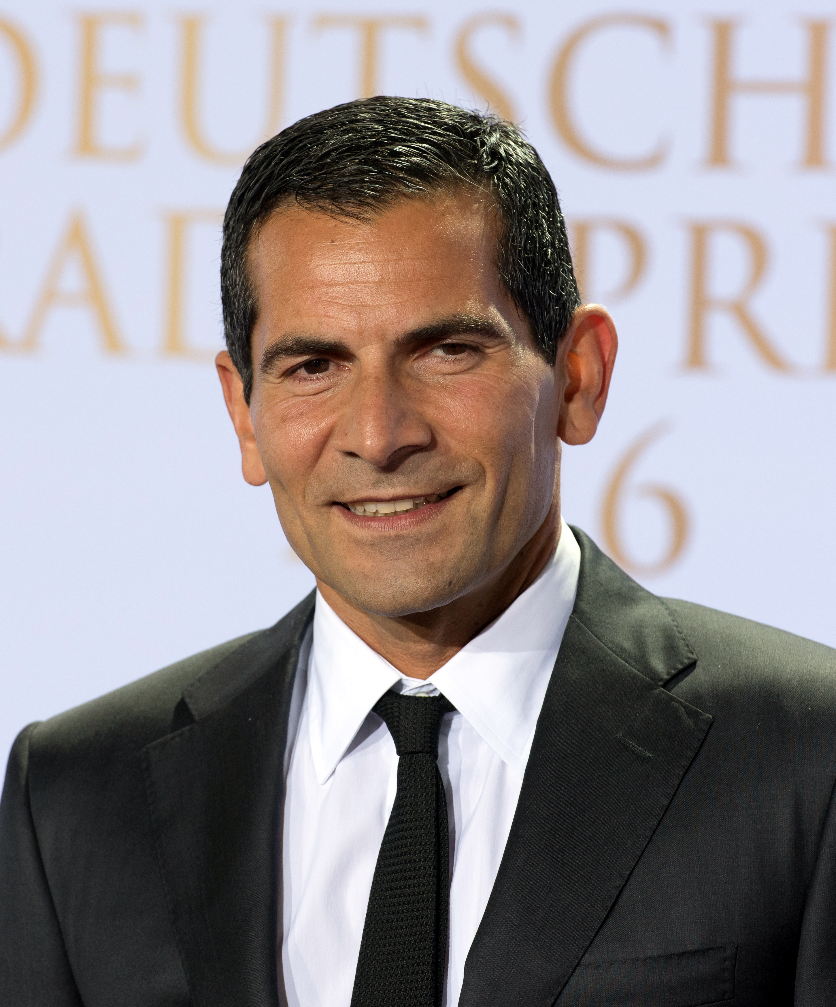 Mitri Sirin beim Deutschen Radiopreis 2016 im Schuppen 52 in Hamburg